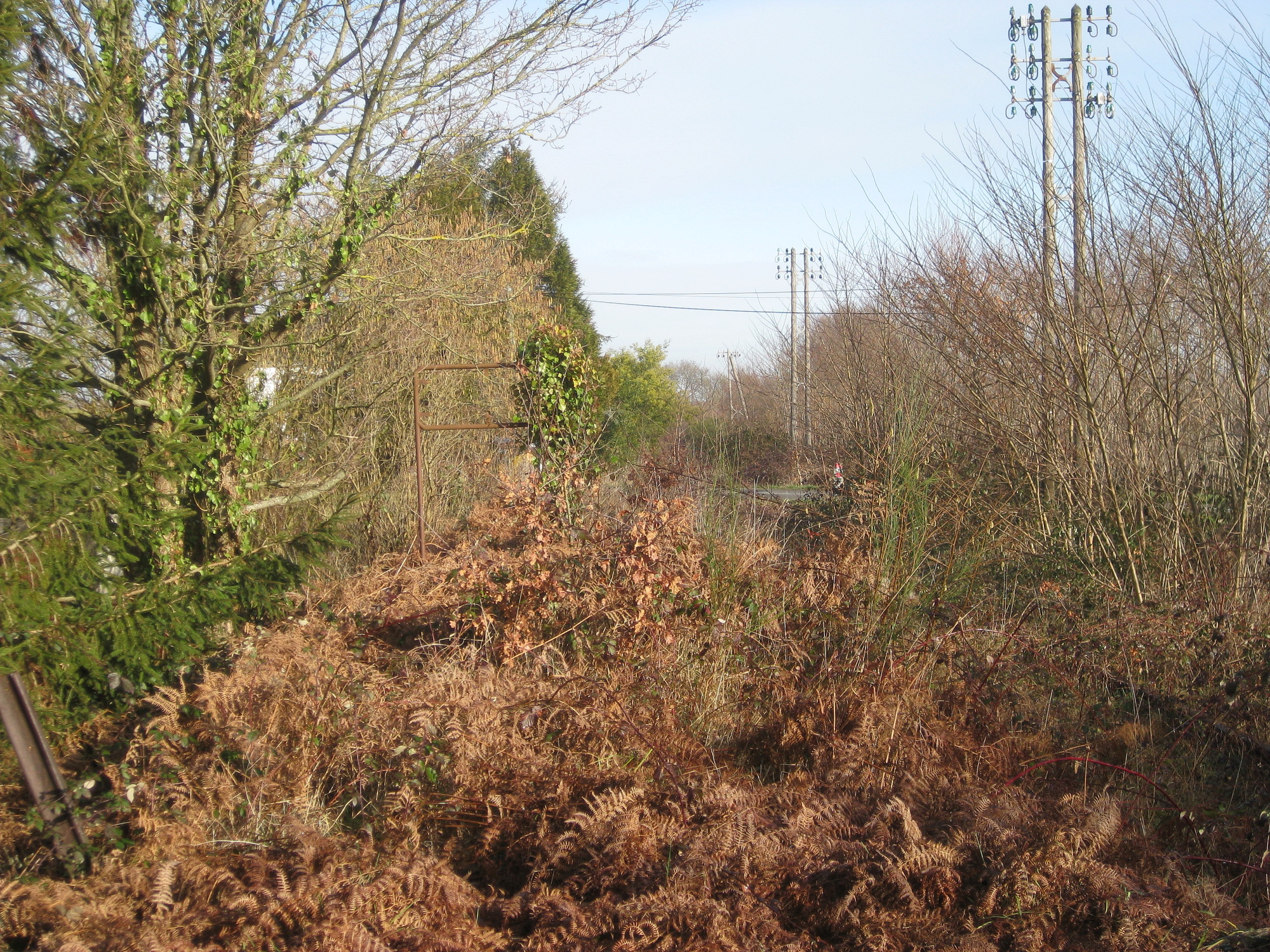 La voie unique au niveau de la Halte de Casson sur la ligne Nantes - Châteaubriant, avant les travaux de réouverture de la ligne.